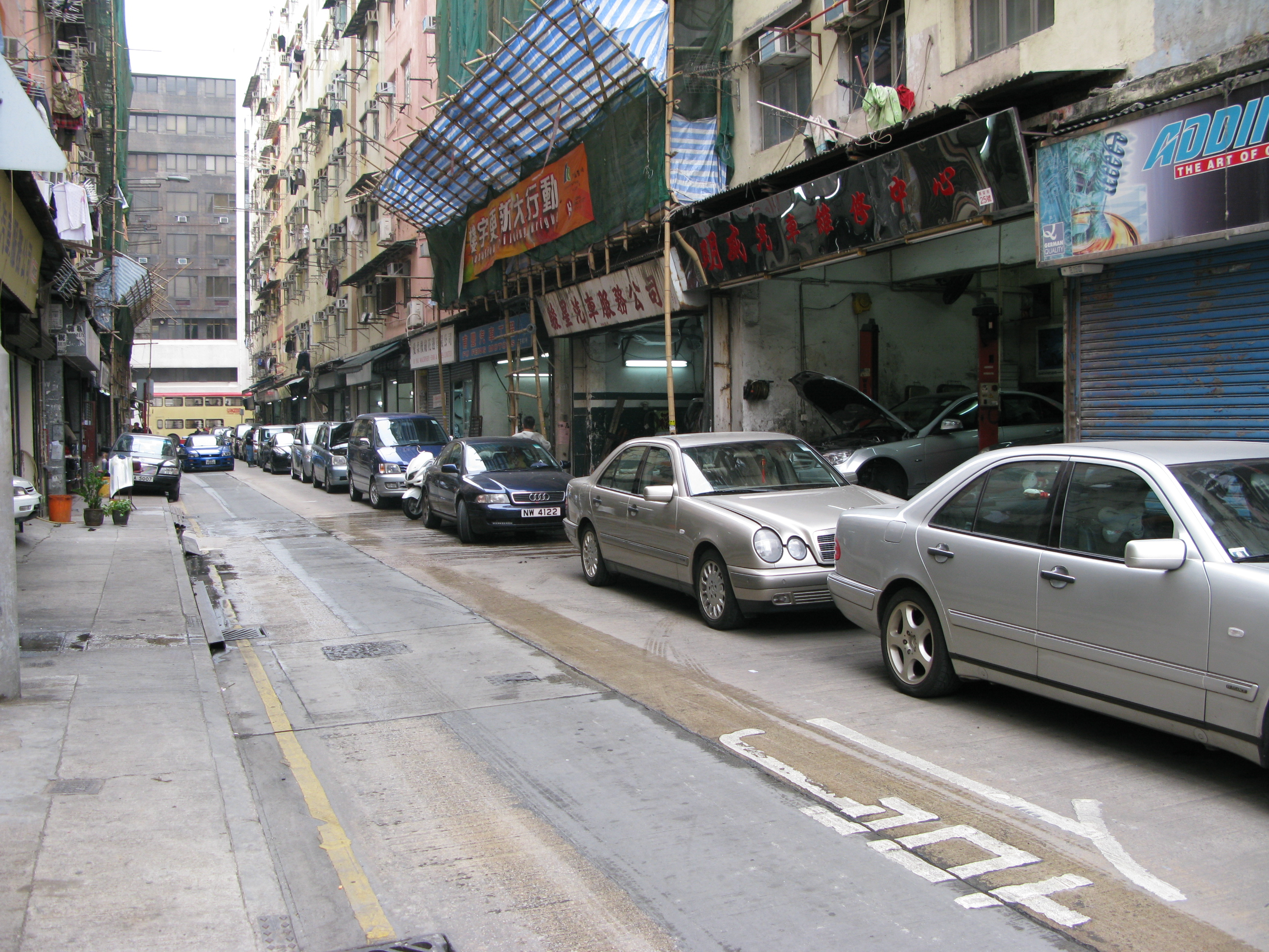 中文（香港）: 香港九龍土瓜灣十三街燕安街